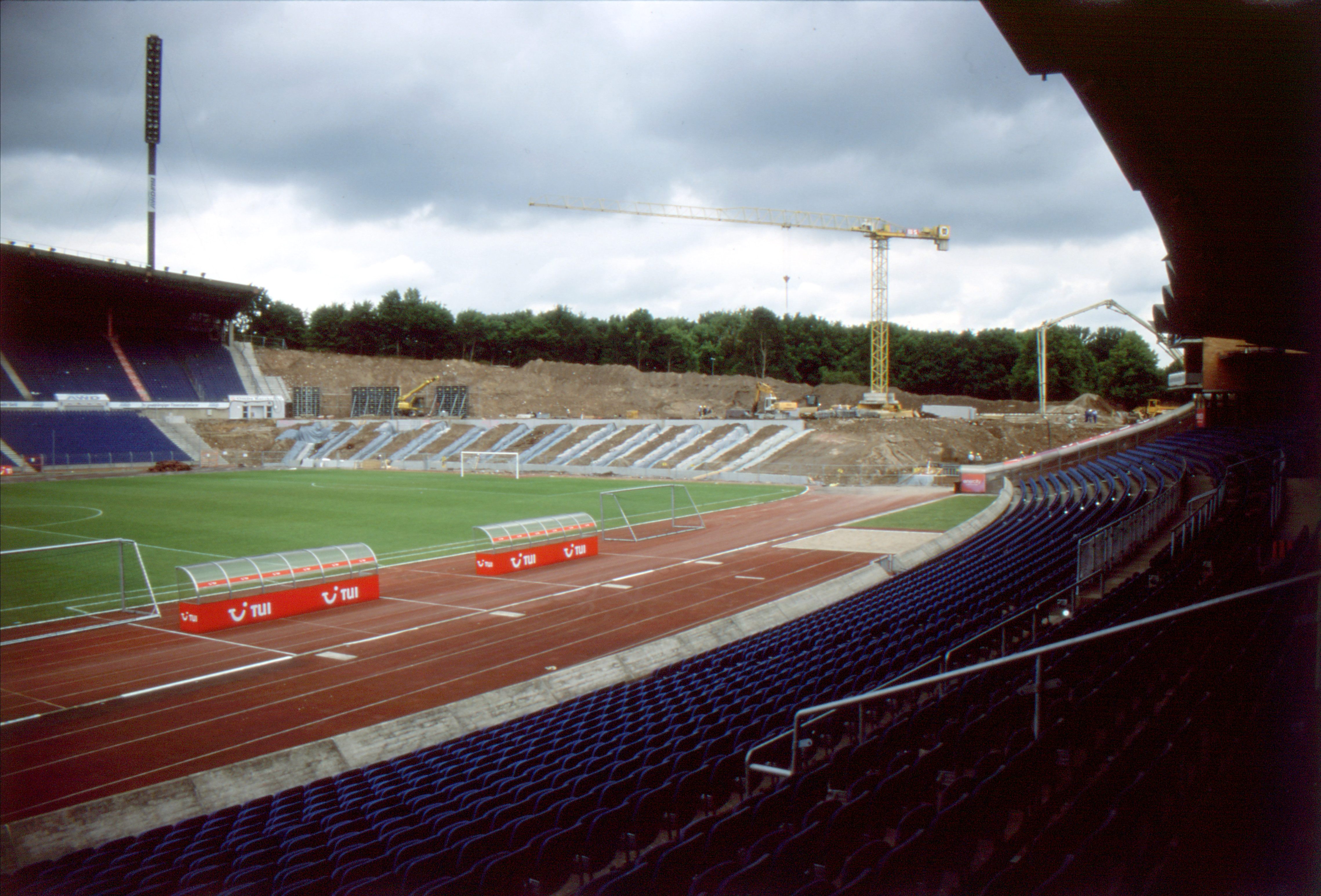 Aufgenommen im Mai 2003, Umbau des Niedersachsenstadions.